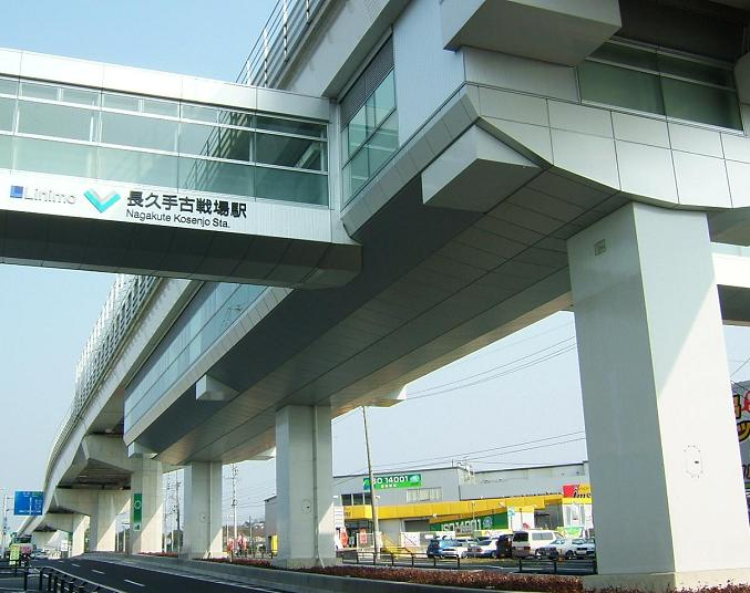 愛知県愛知郡長久手町大字岩作に所在する東部丘陵線（リニモ）の長久手古戦場駅。